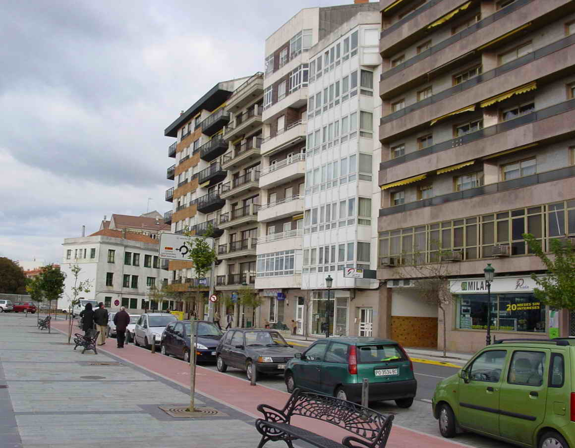 Vilagarcía - Galicia - Spain